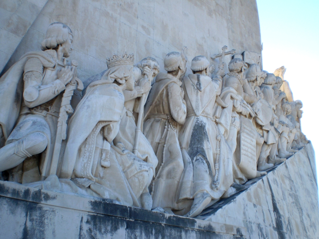 Հայտնագործությունների հուշարձանը Լիսաբոնում